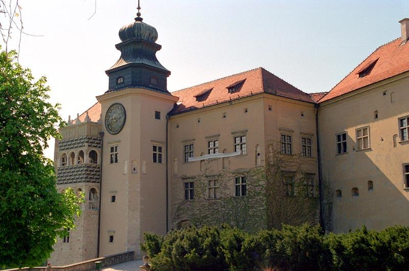 Castle Pieskowa Skala in Malopolska (Poland)